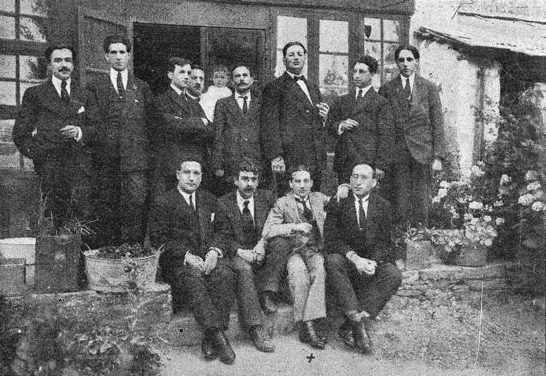 Banquete homenaxe a Mario López Blanco, director da revista Maruxa, fotografía en Vida Gallega 1917